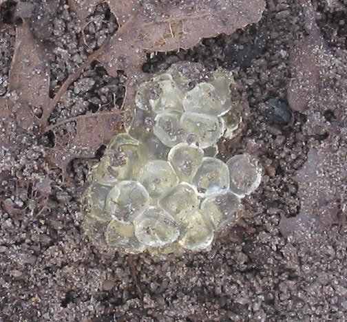 zelfgemaakte foto van eitjes van een grote naaktslak